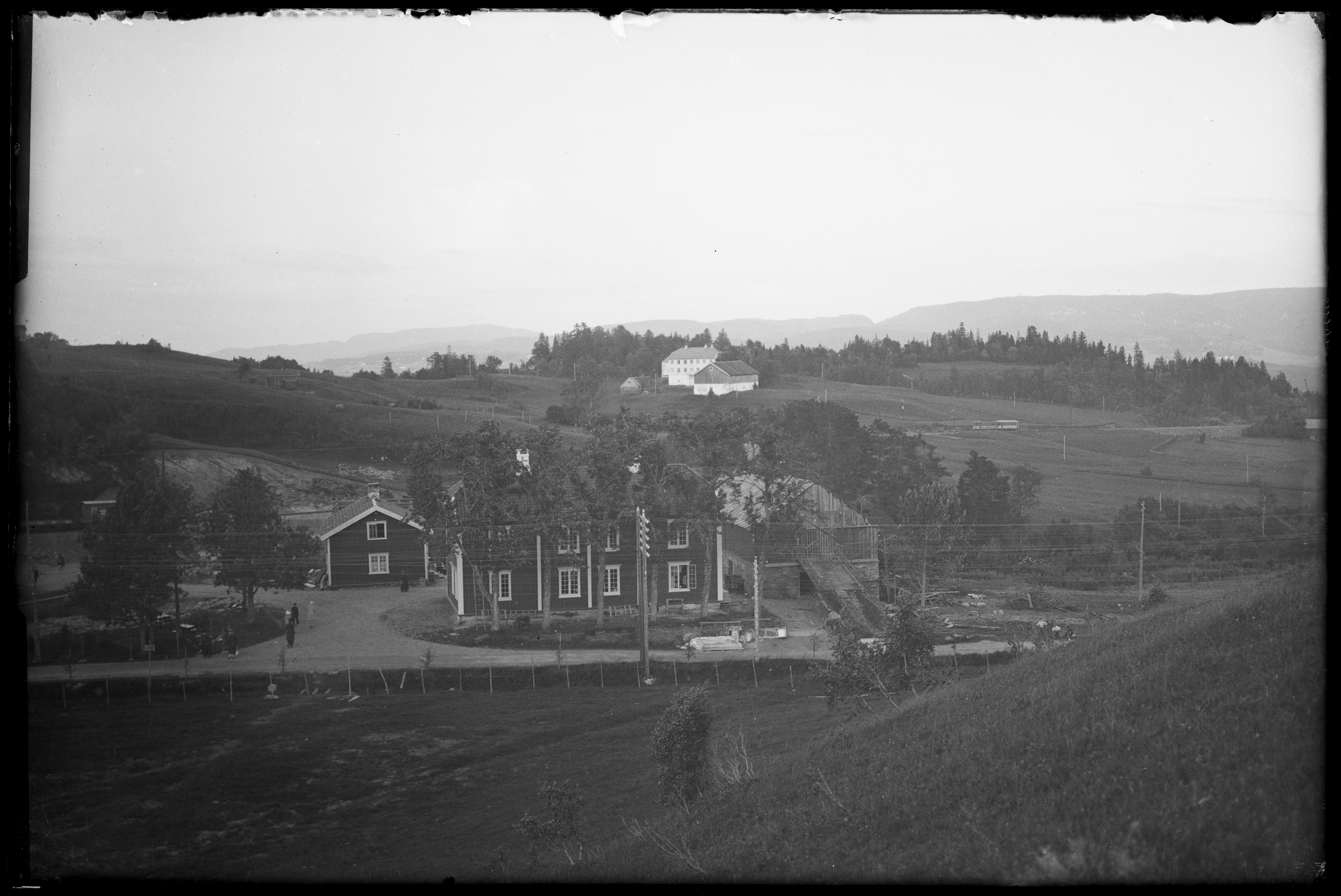 Hovedbygningen til Ugla gård i forkant. Trikkelinja til Gråkallbanen kom til høyre på bildet. Den lyse gården i bakgrunnen er Ferstad gård. Veien foran Ugla gård ble utbygd til det som i dag er Gamle Oslovei.